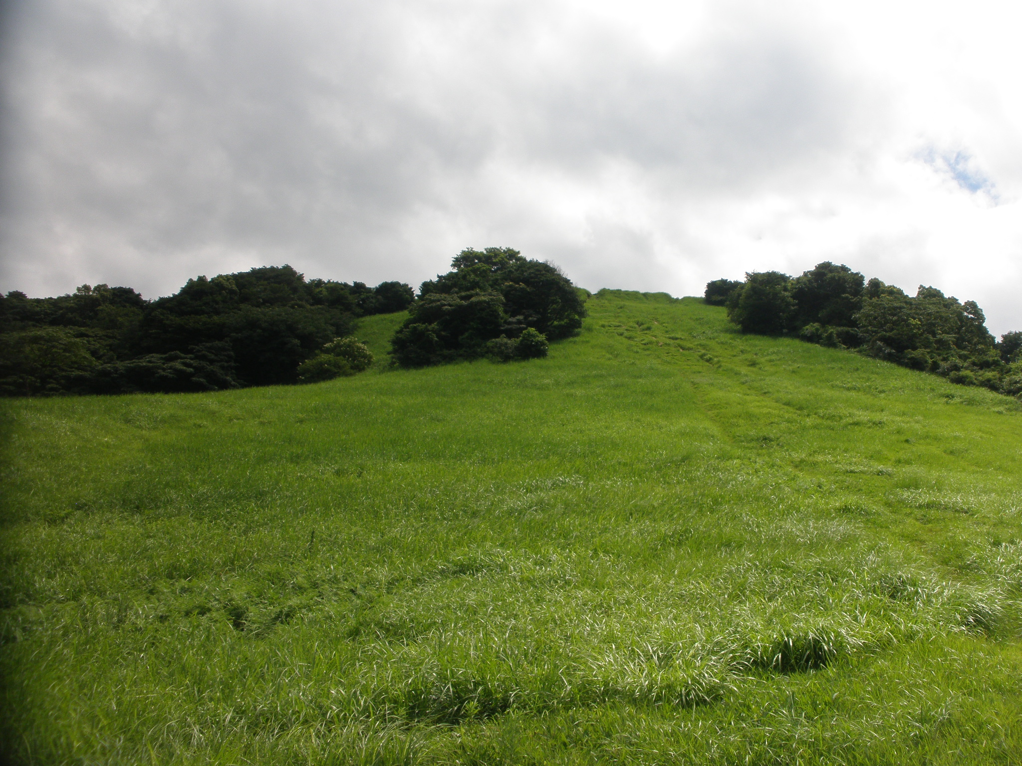 急斜面の頂上部に、更に土塁を造る事で、攻略を困難にする目的が見える